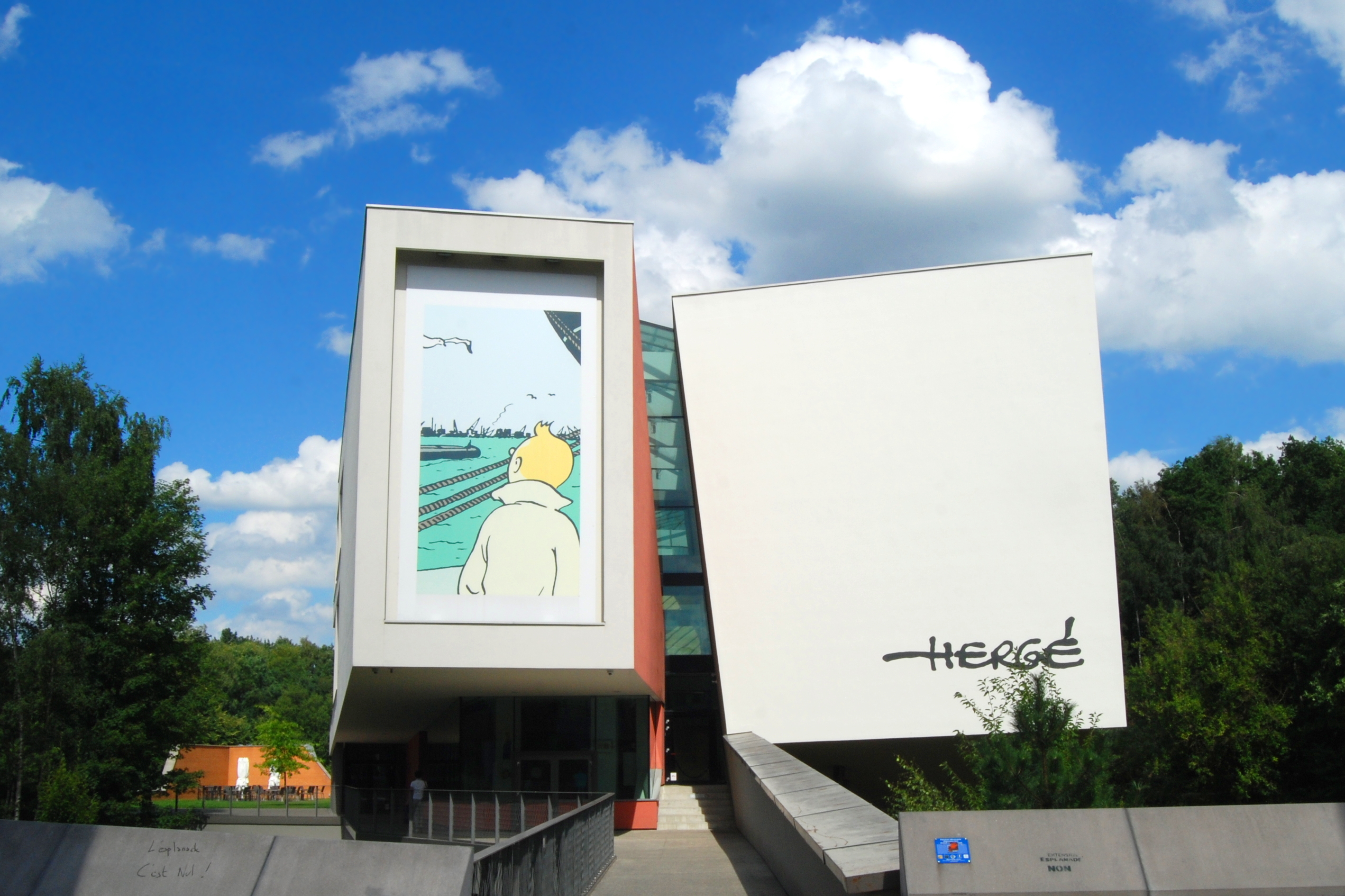 Belgique - Louvain-la-Neuve - Musée Hergé (architecte français Christian de Portzamparc - 2009)